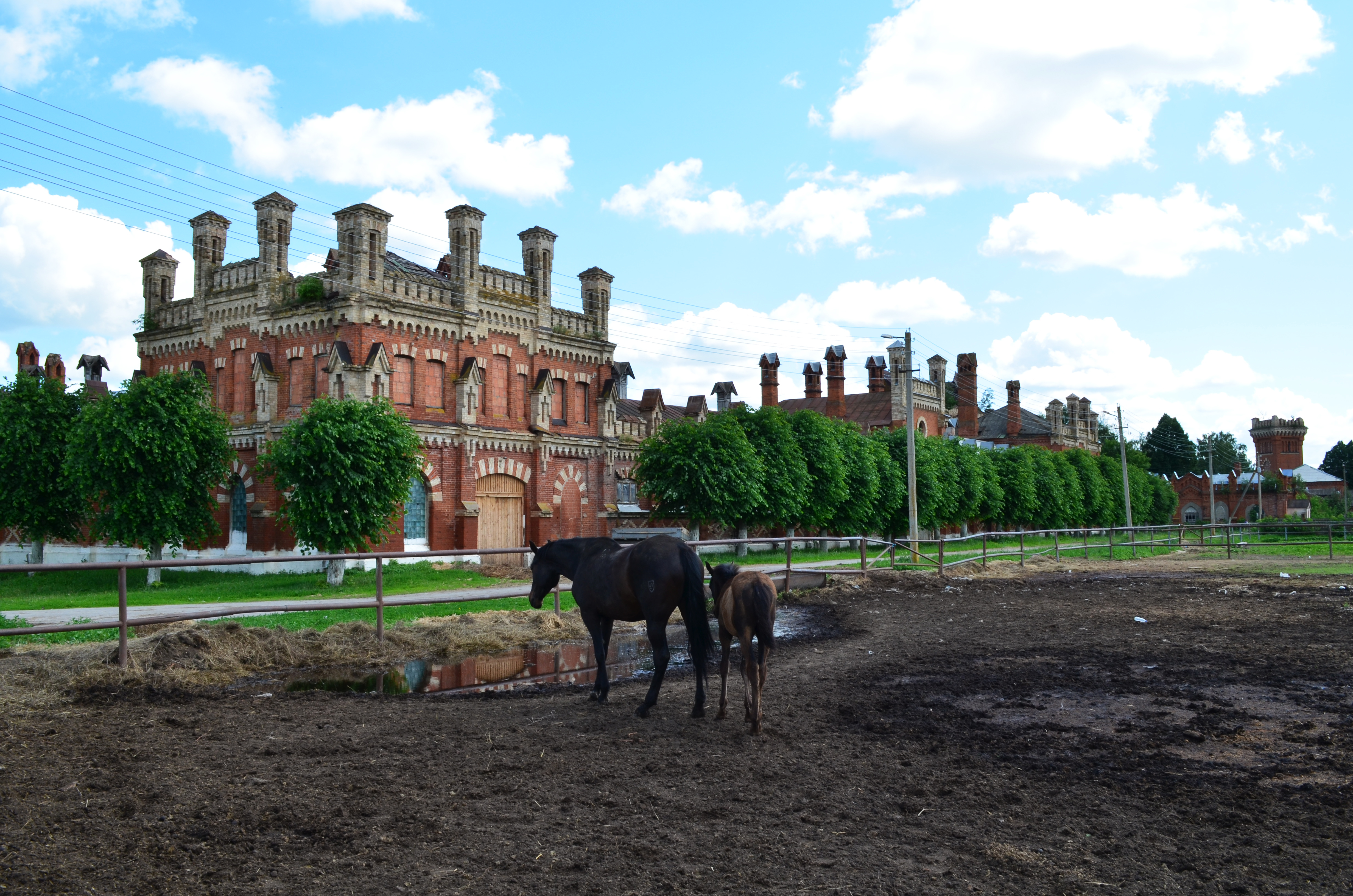 Конезавод П.П.Фон Дервиза,мл.сына барона П.Г.Фон Дервиза в пгт.Старожилово Рязанской области.Архитектор Фёдор Осипович Шехтель.19 век.